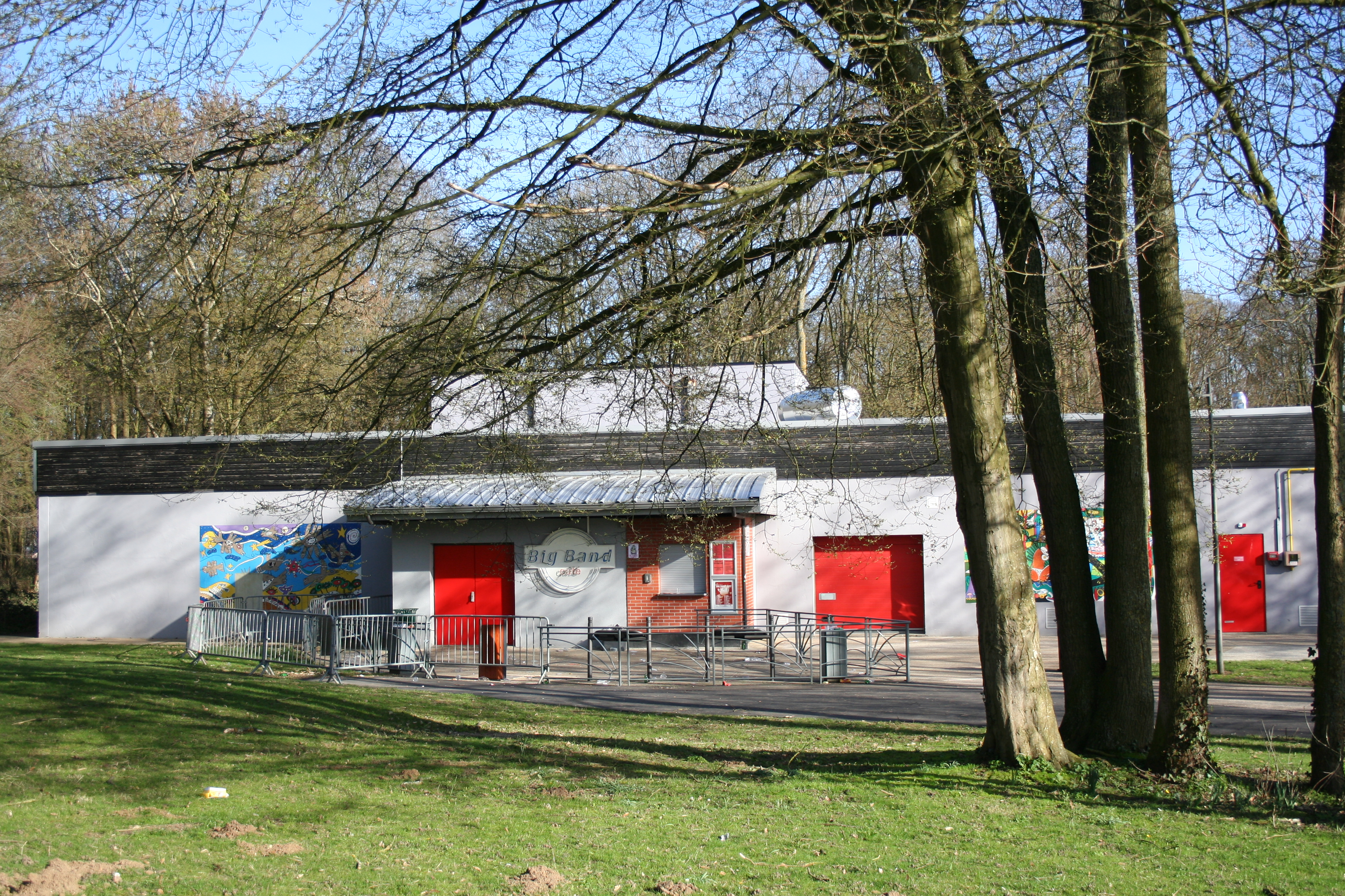 Salle de musiques actuelles, le BBC à Hérouville Saint Clair (14200)